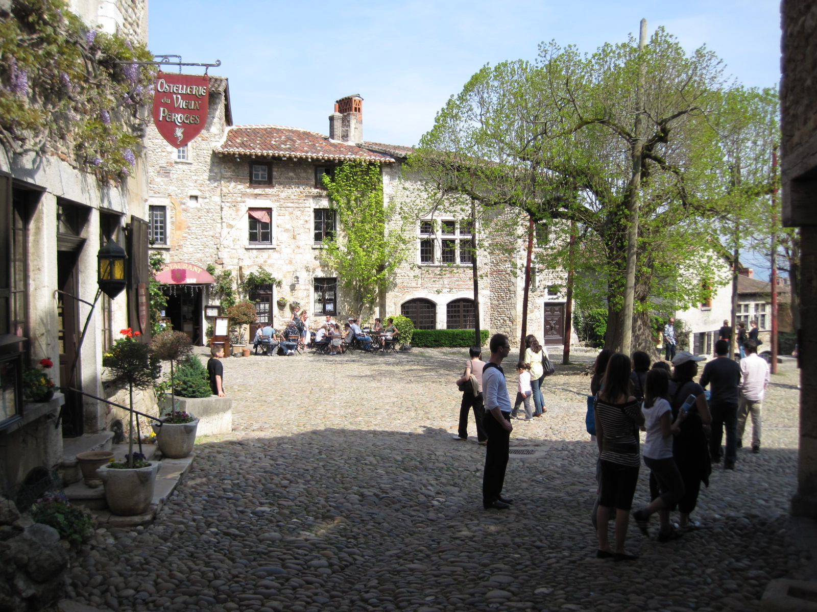 Pérouges